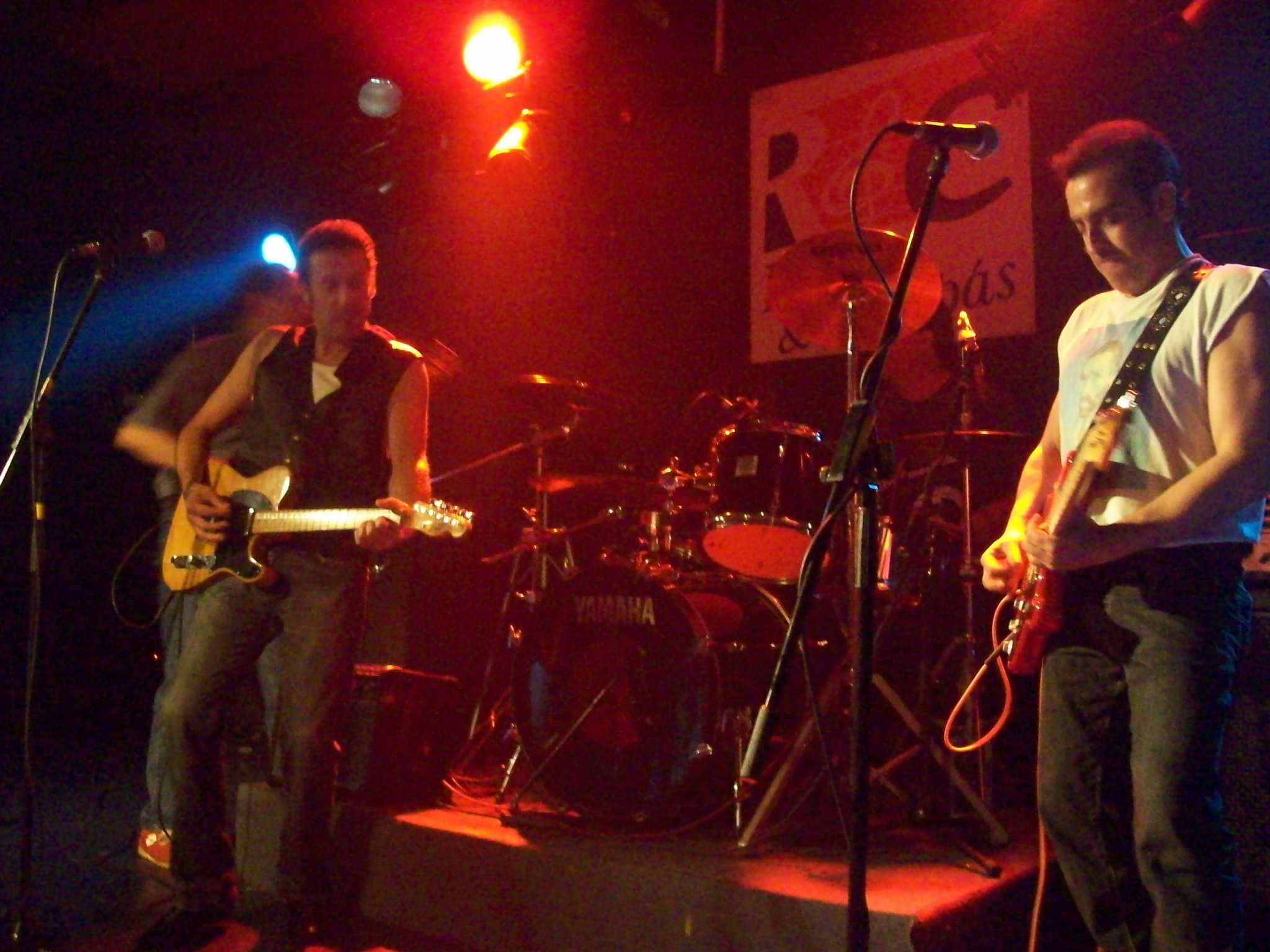 Callejones en concierto, junio 2010.